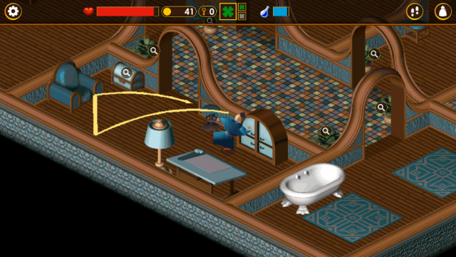 Capture d'écran du jeu vidéo Little Big Adventure, ici dans son portage pour appareils mobiles (2014).